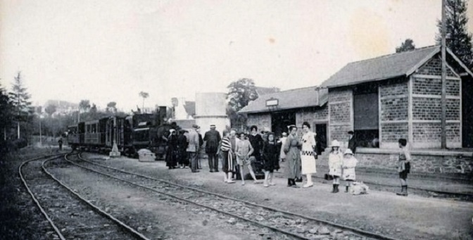 Plestin La gare et l'arrivée du train de Lannion